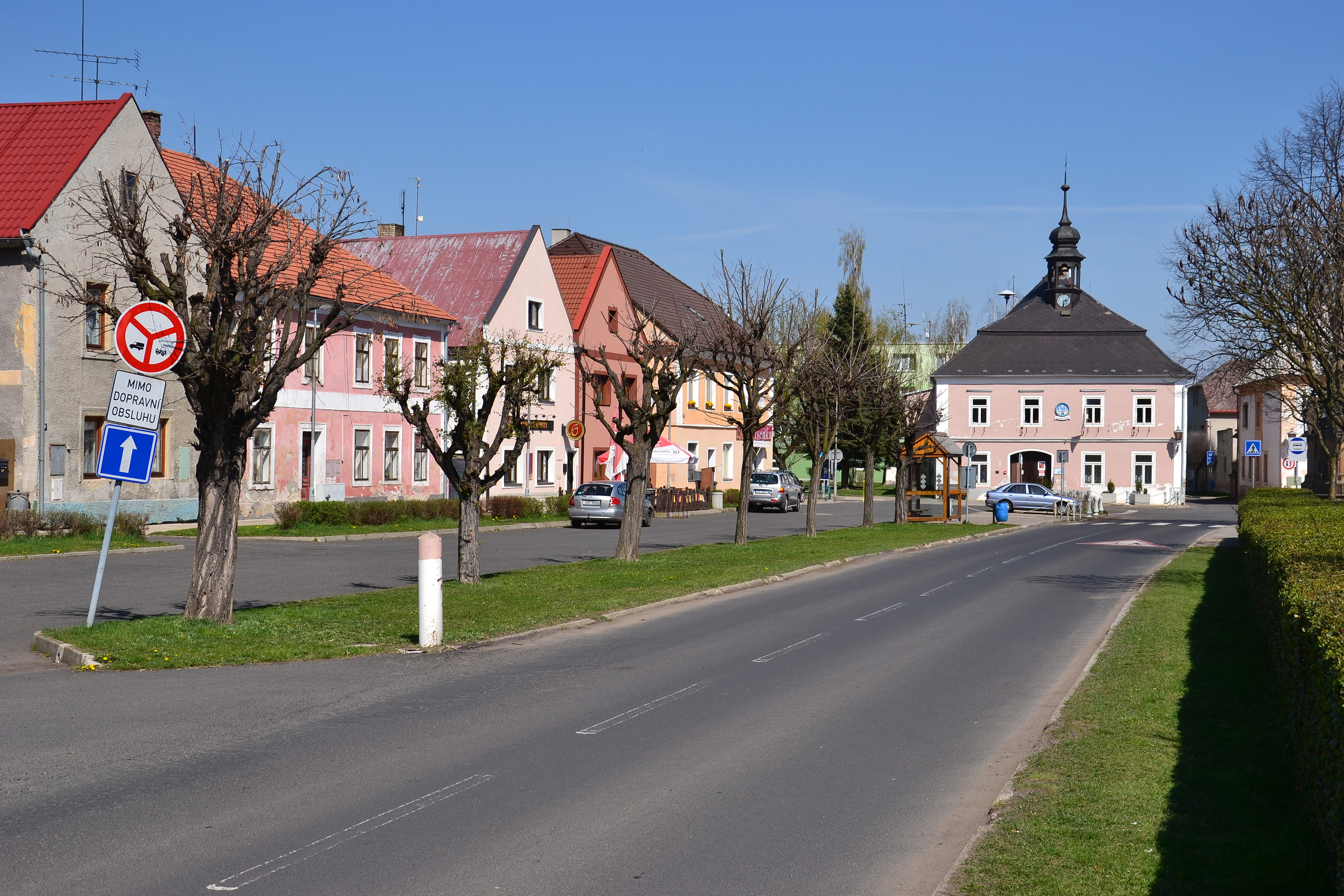 Náměstí ve Vilémově